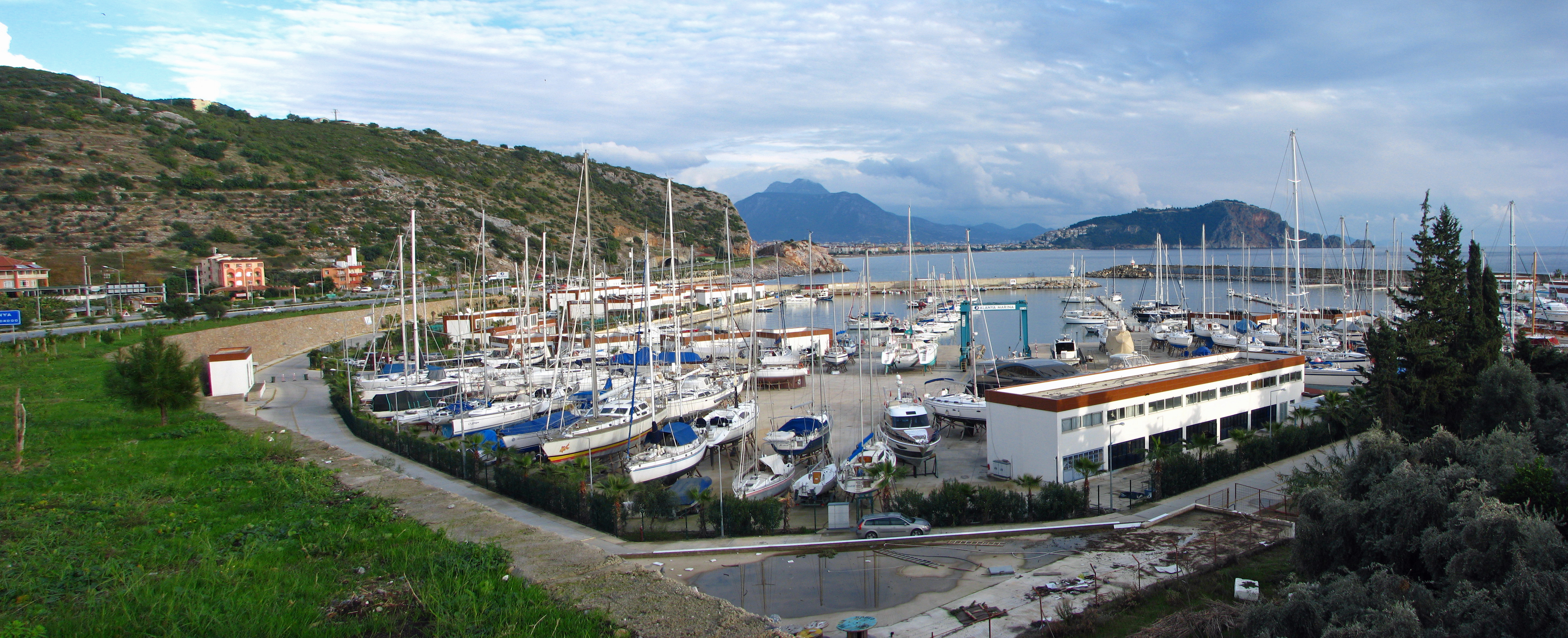 Alanya Marina, Türkiye